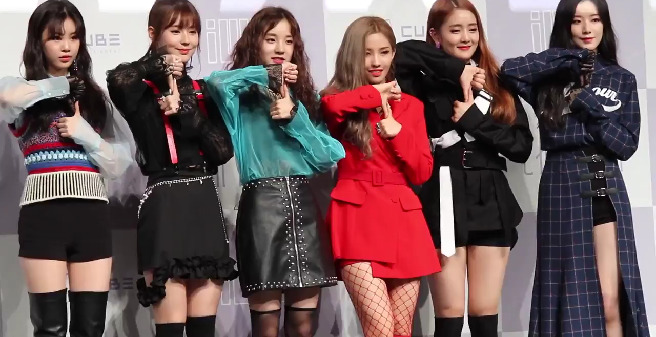 (G)I-DLE no horário de fotos do 'Latata' Showcase em 2 de maio de 2018